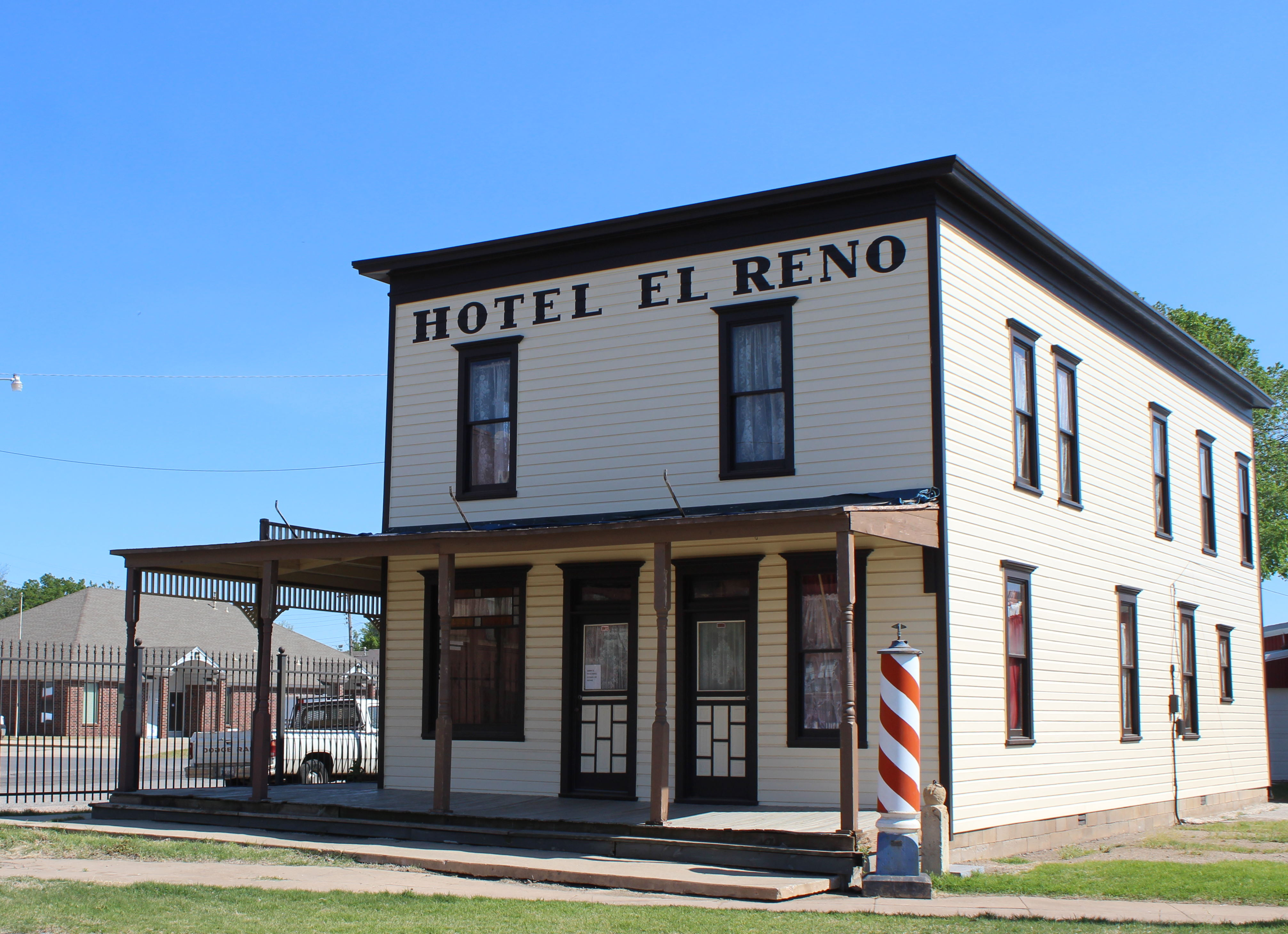 El Reno, OK USA